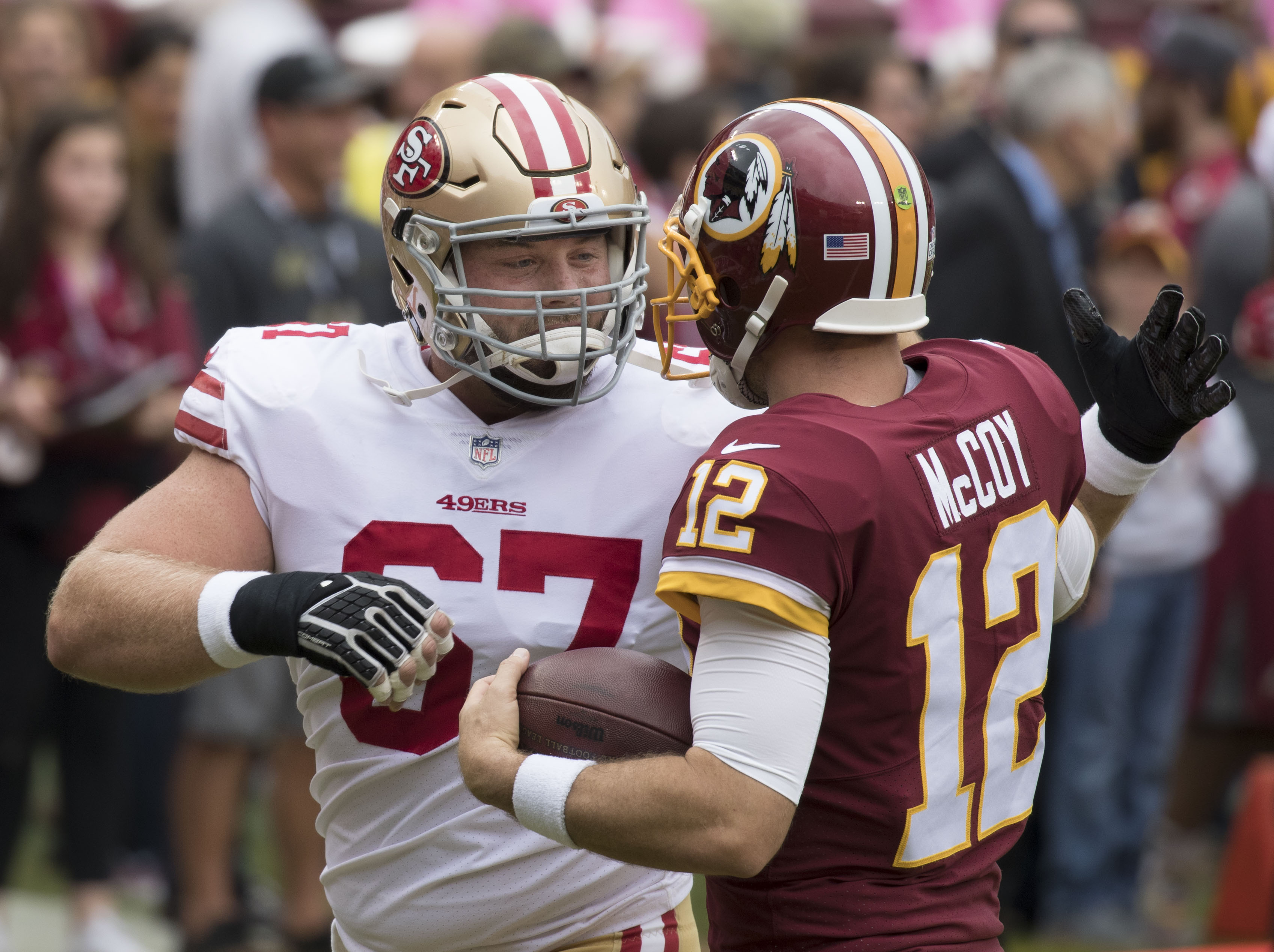 49ers at Redskins 10/15/17